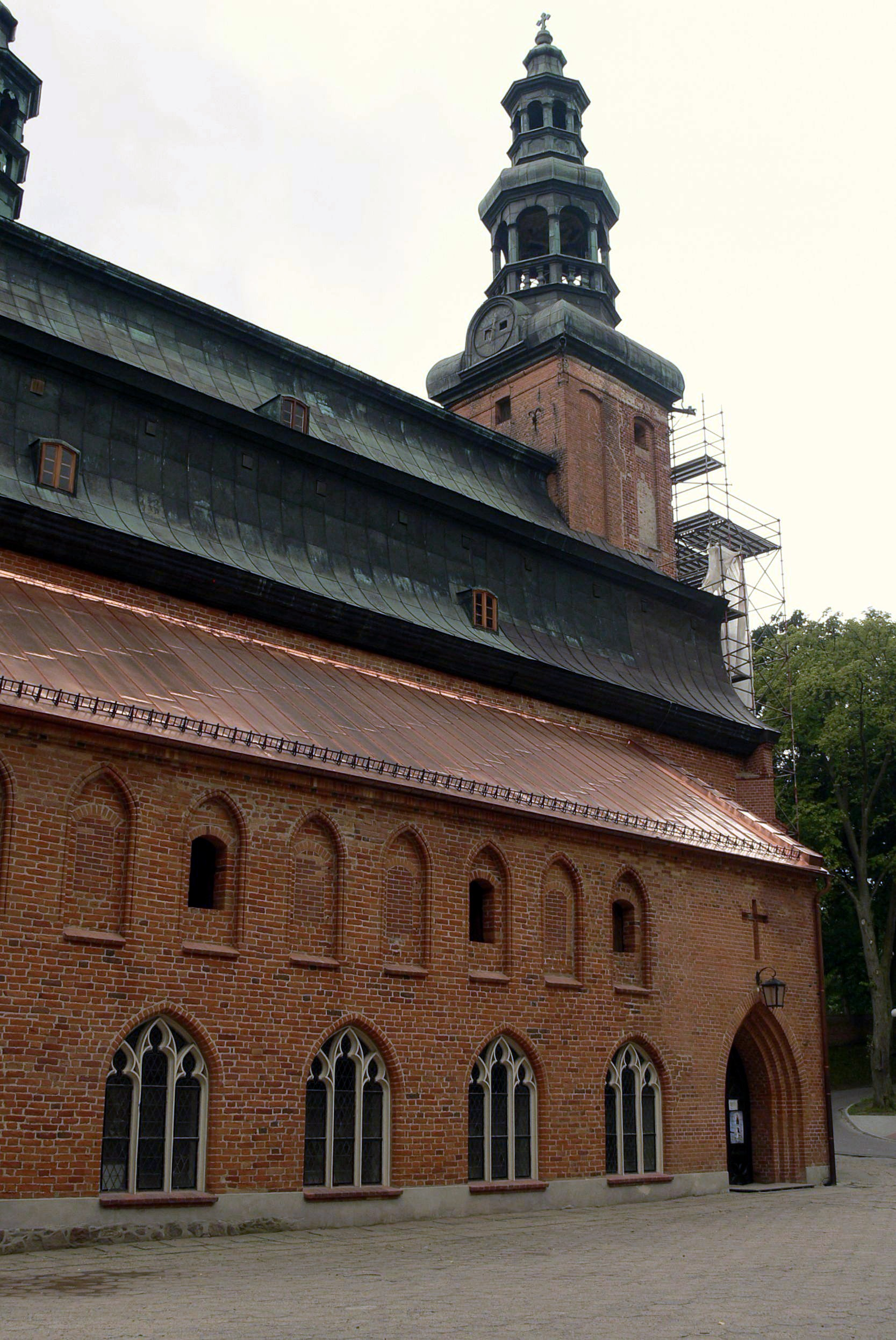 Kartuzy, ul. Klasztorna 3 - Kolegiata Wniebowzięcia Najświętszej Maryi Panny w zespole klasztoru kartuzów - Kartuzja Gdańska.